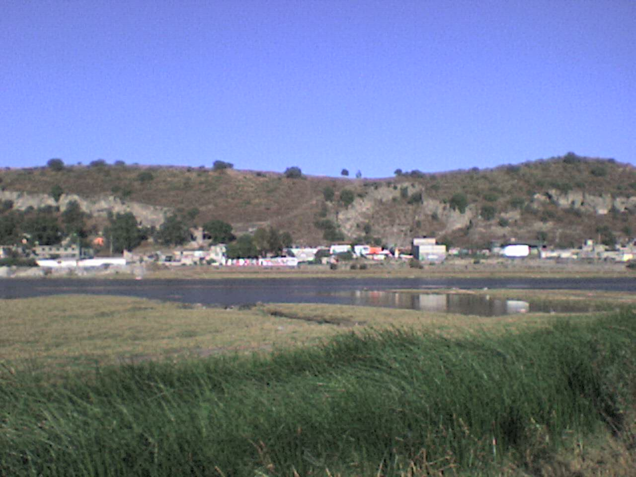 Vista parcial del Volcán de Xico, se aprecia una parte de las Lagunas que se encuentran próximas a él.